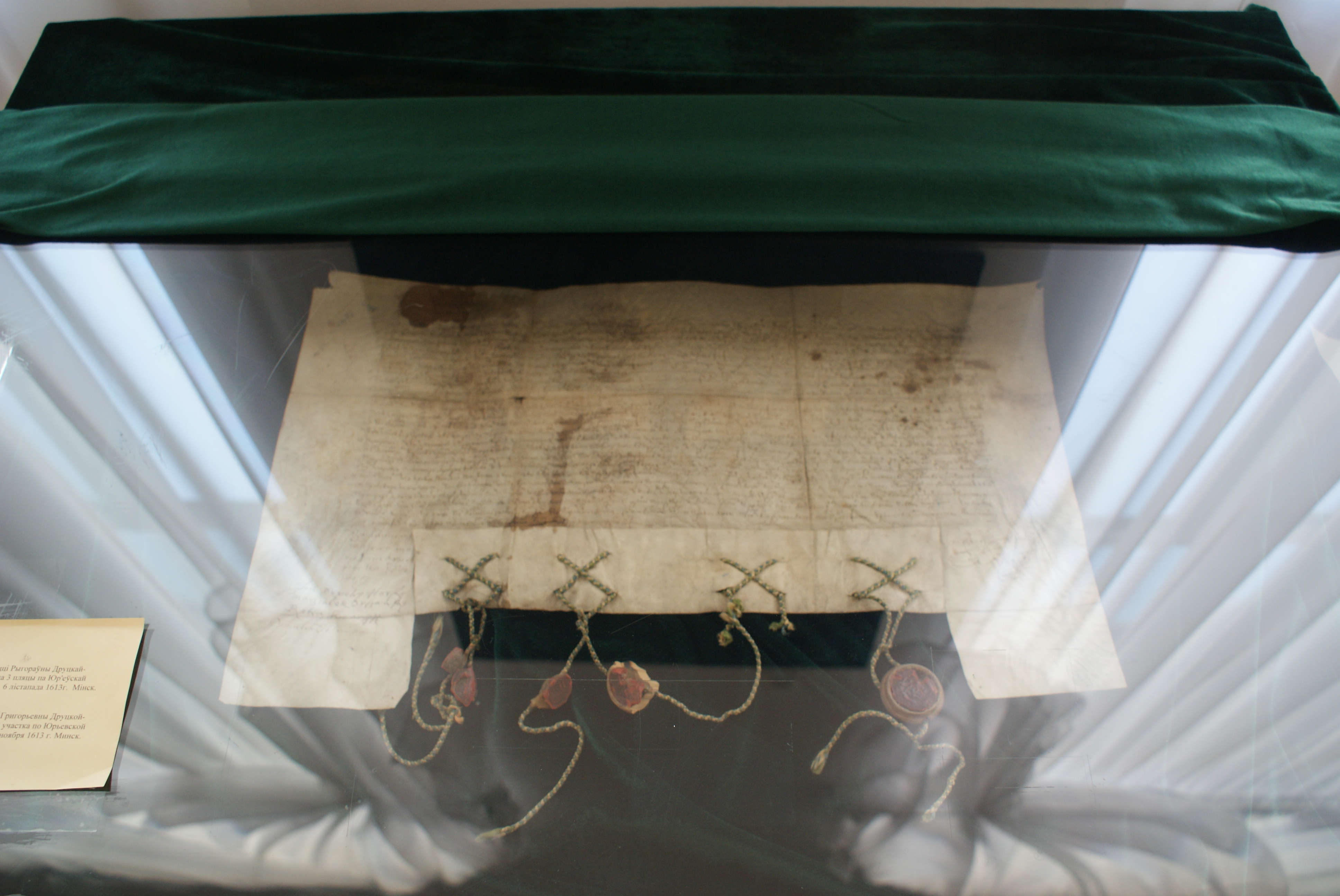 Фундуш маршалкавай Багданавай Стэцкевічавай княжны Аўдоцці Рыгораўны Друцкай-Горскай праваслаўнаму Петрапаўлаўскаму манастыру на 3 пляцы па Юр'еўскай вуліцы ў Мінску для пабудовы манастырскай царквы. 6 лістапада 1613 г. Мінск. Пергамент, рукапіс